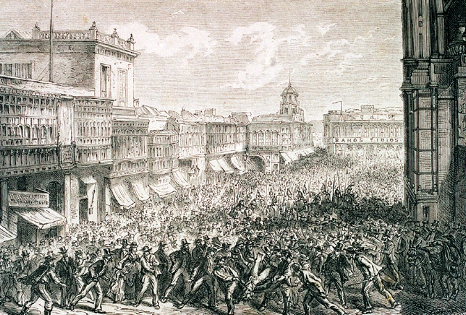 El populacho de Lima arrastrando el cádáver del coronel Marceliano Gutiérrez hasta la plaza de armas. Lima, Perú, 27 de julio de 1872.